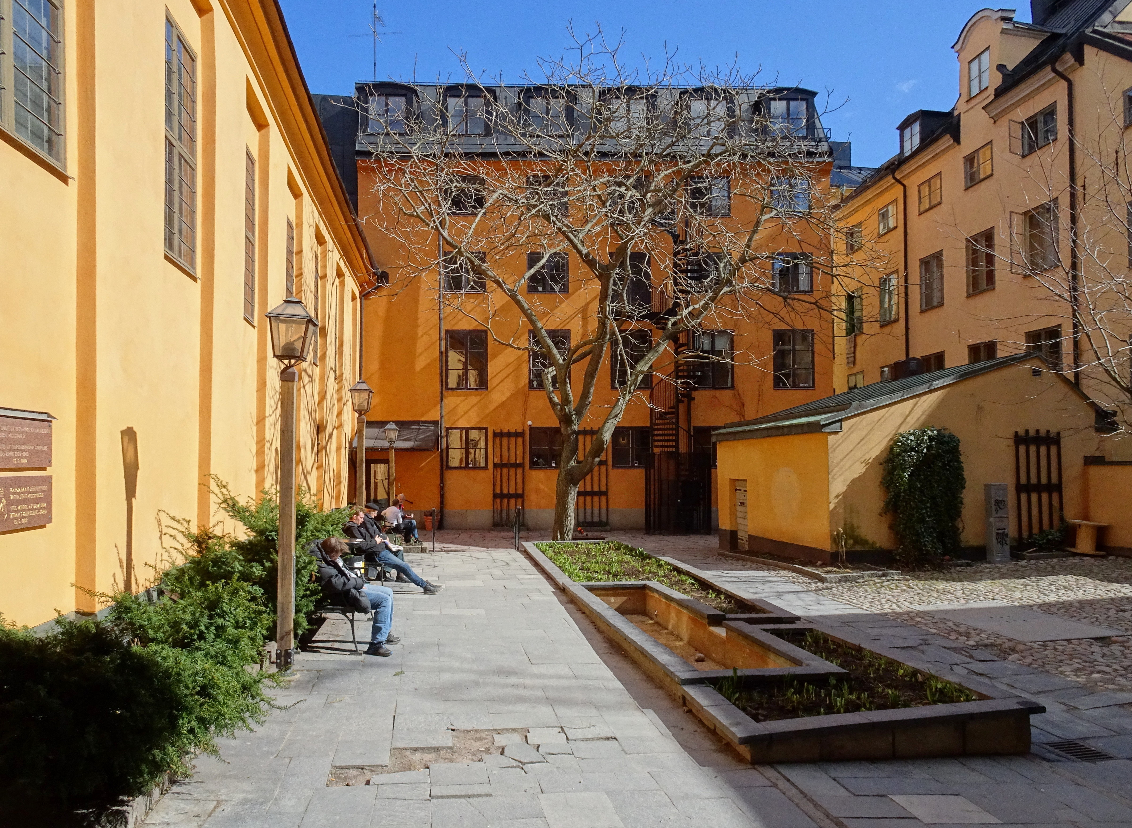 Bollhustäppan